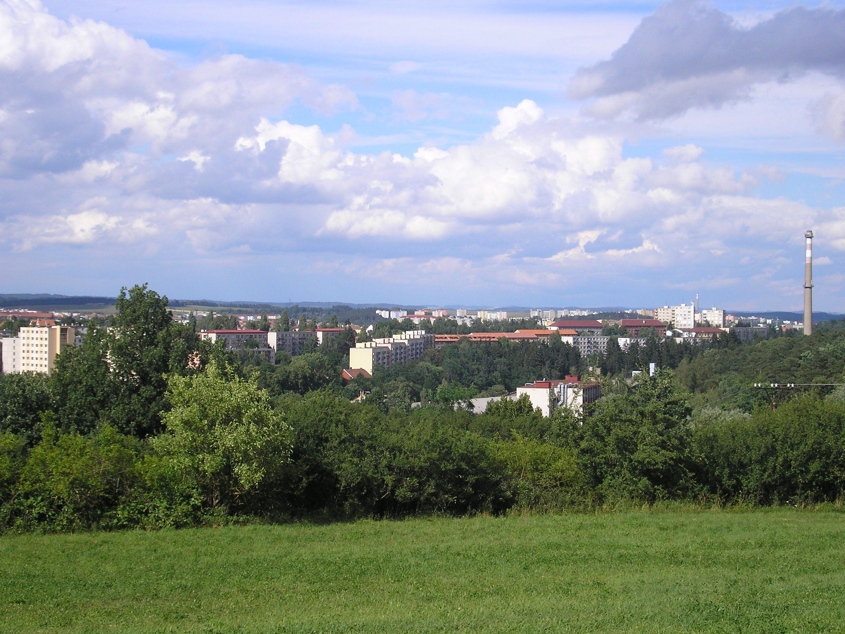 Třebič Borovina - old part - all view